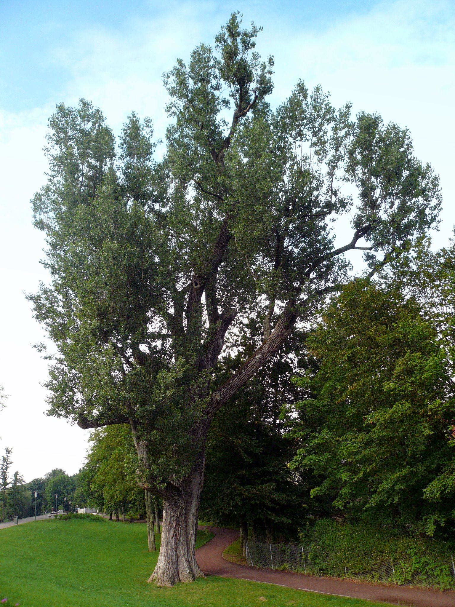 Kanadische Pappel (Populus × canadensis) bei Bad Kissingen